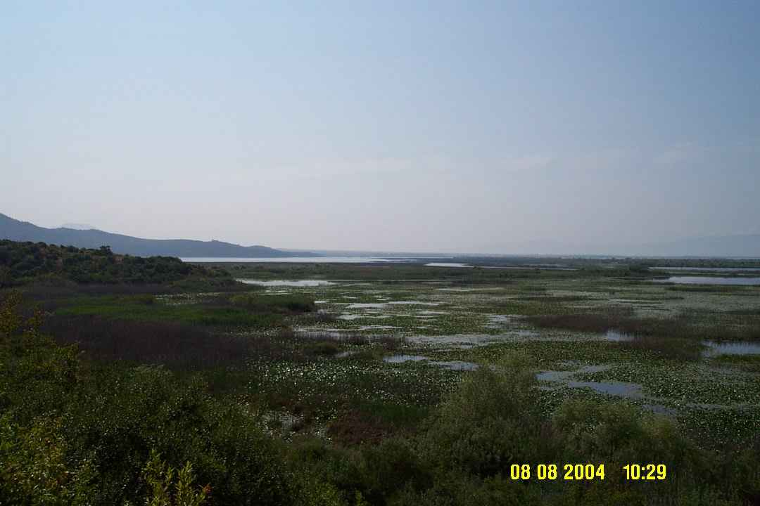 Skadarské jezero - Fotografie z černohorské strany